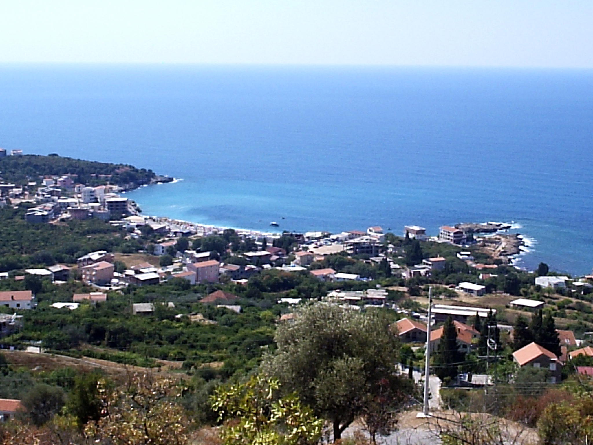 Добре Воде